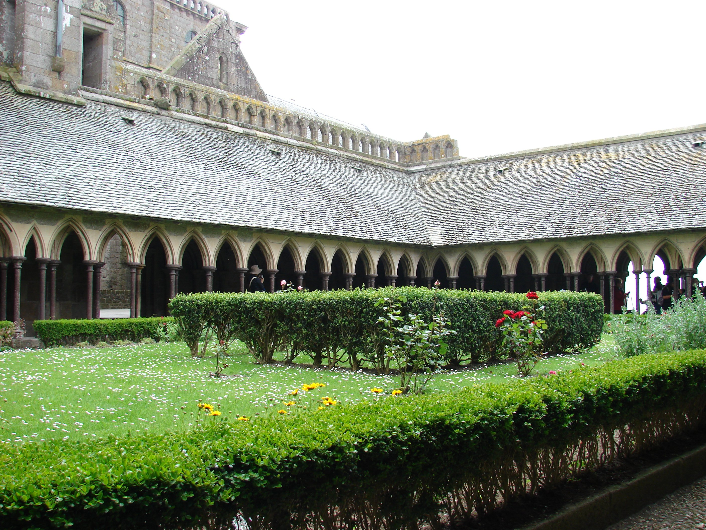 Claustrum mont Saint Michel